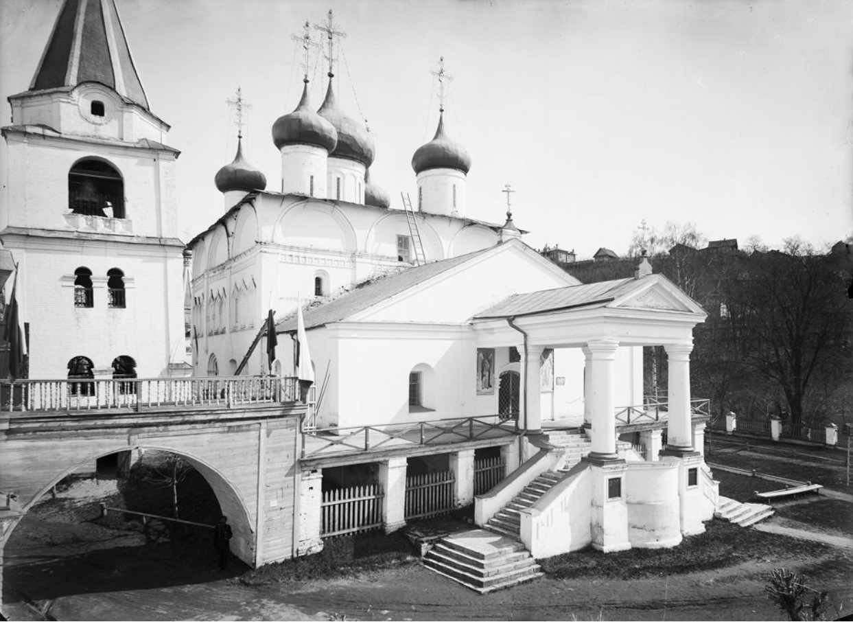 Вознесенский собор Печерского монастыря в Нижнем Новгороде.